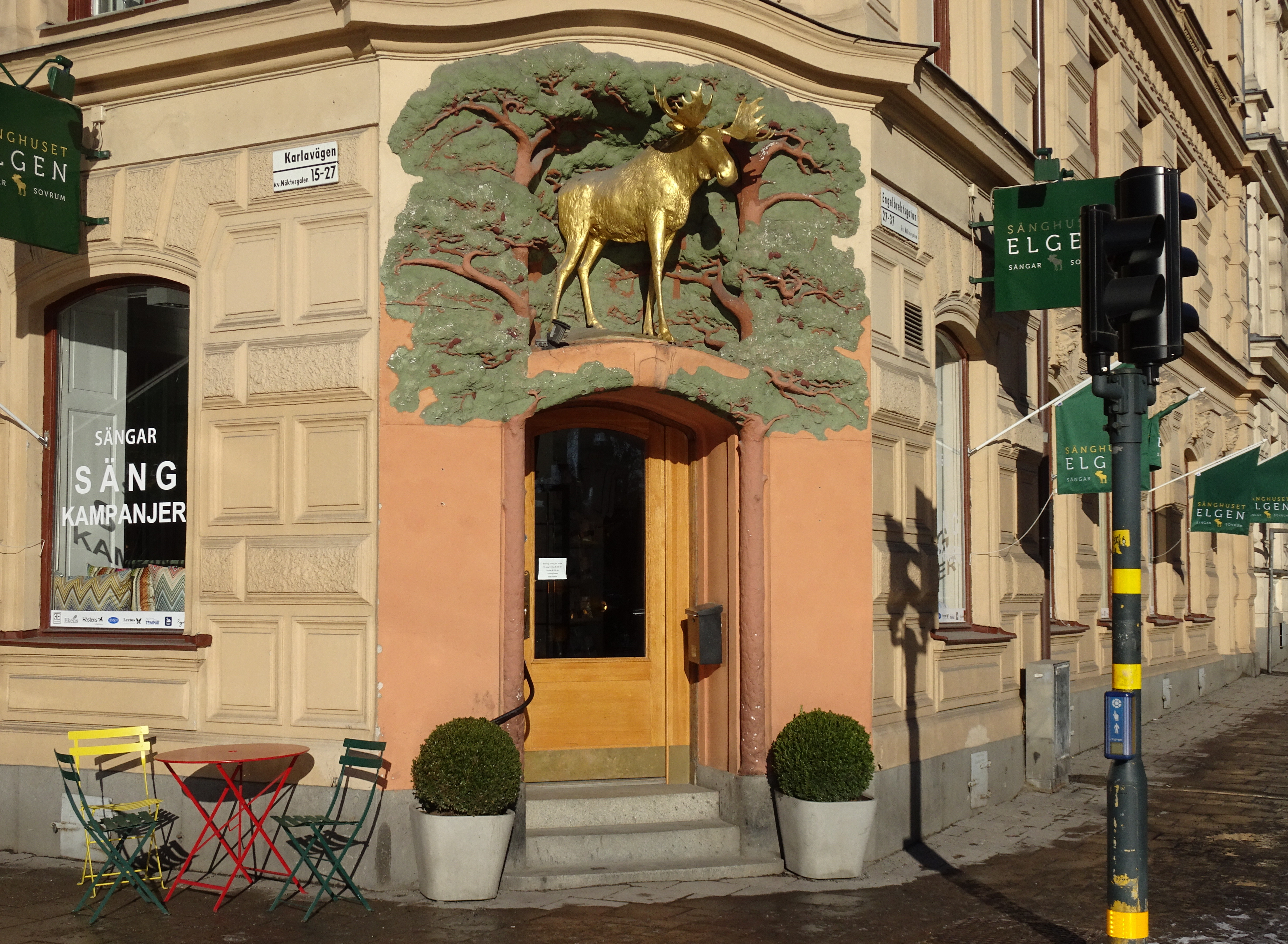 Apoteket Älgen (Elgen) vid Karlavägen 27, Engelbrektsgatan 27, Stockholm. Apoteket öppnade 1904 och Älgen i förgylld metall ovanför entrén vid Apoteket Älgen skapades av skulptören Carl Fagerberg 1903, medan han ännu studerade vid Konstakademien i Stockholm.